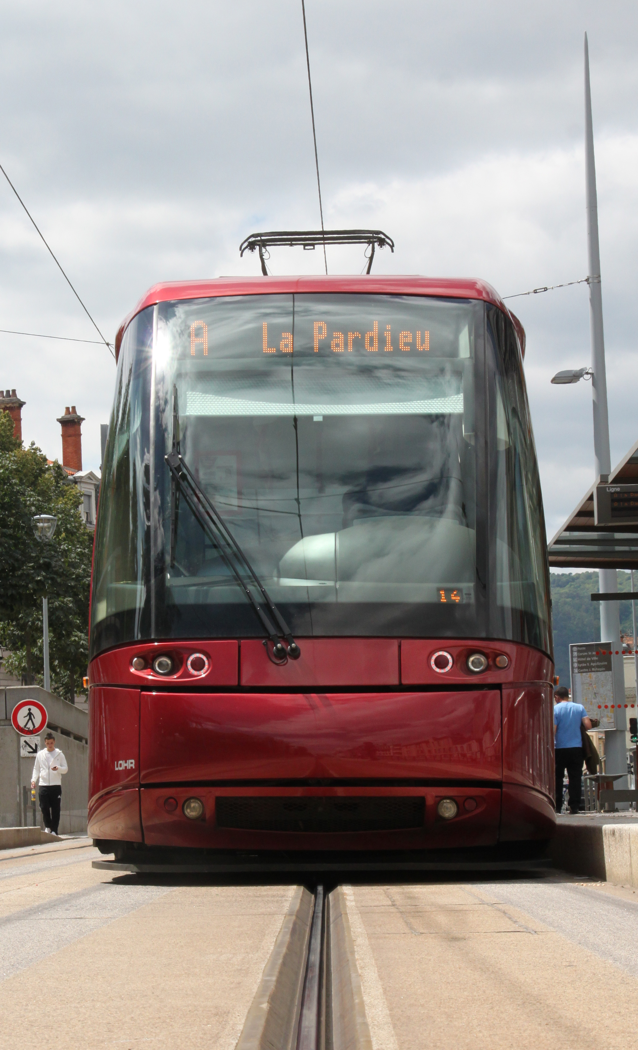 Voor- of achterzijde van een Translohr in Clermont-Ferrand.